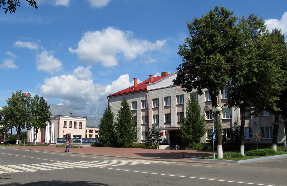 Клічаў. Вуліца Ленінская, 56